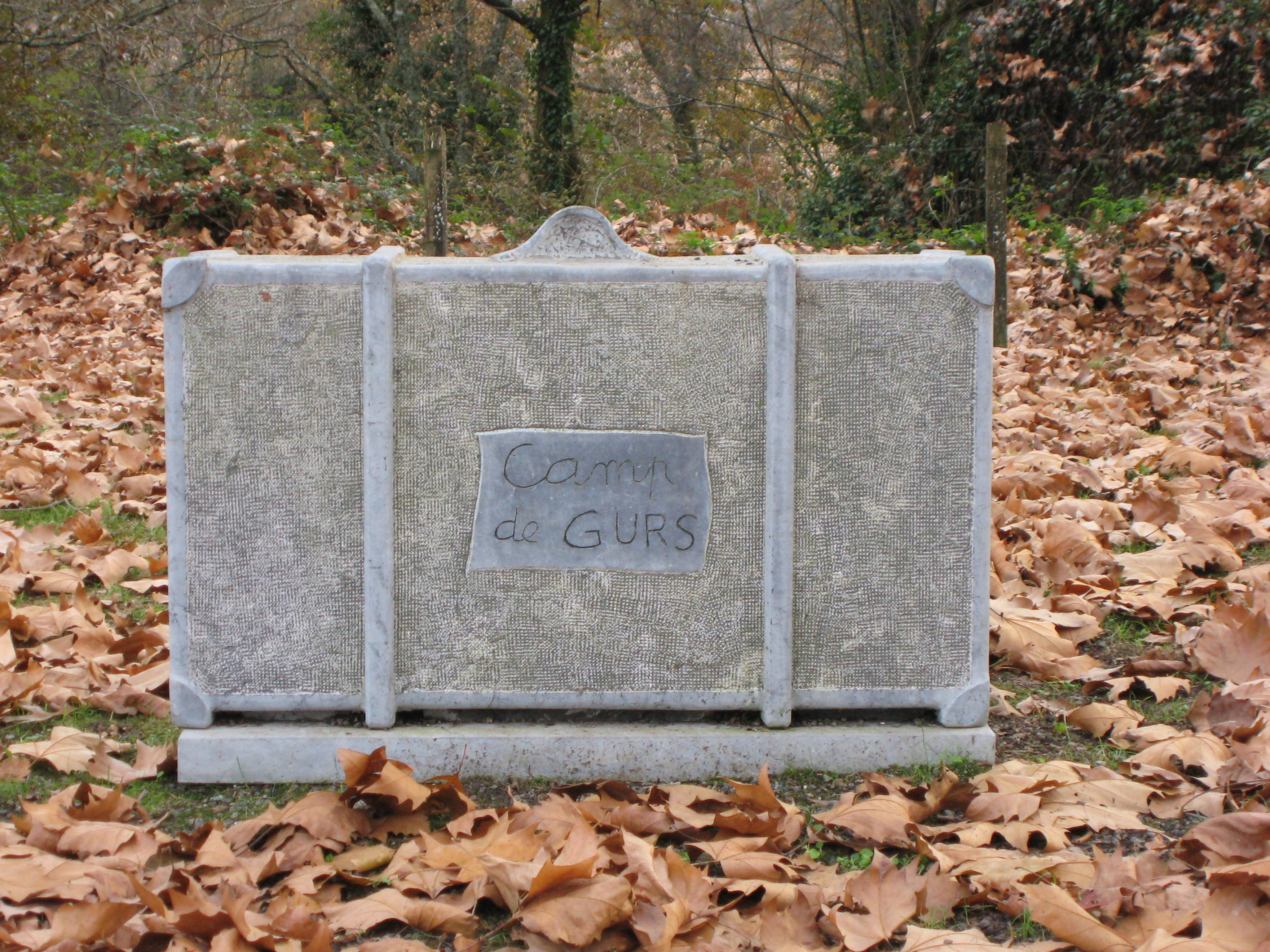 Sculpture représentant une valise de l'époque au camp de Gurs (Pyrénées-Atlantiques) (Pyrénées).